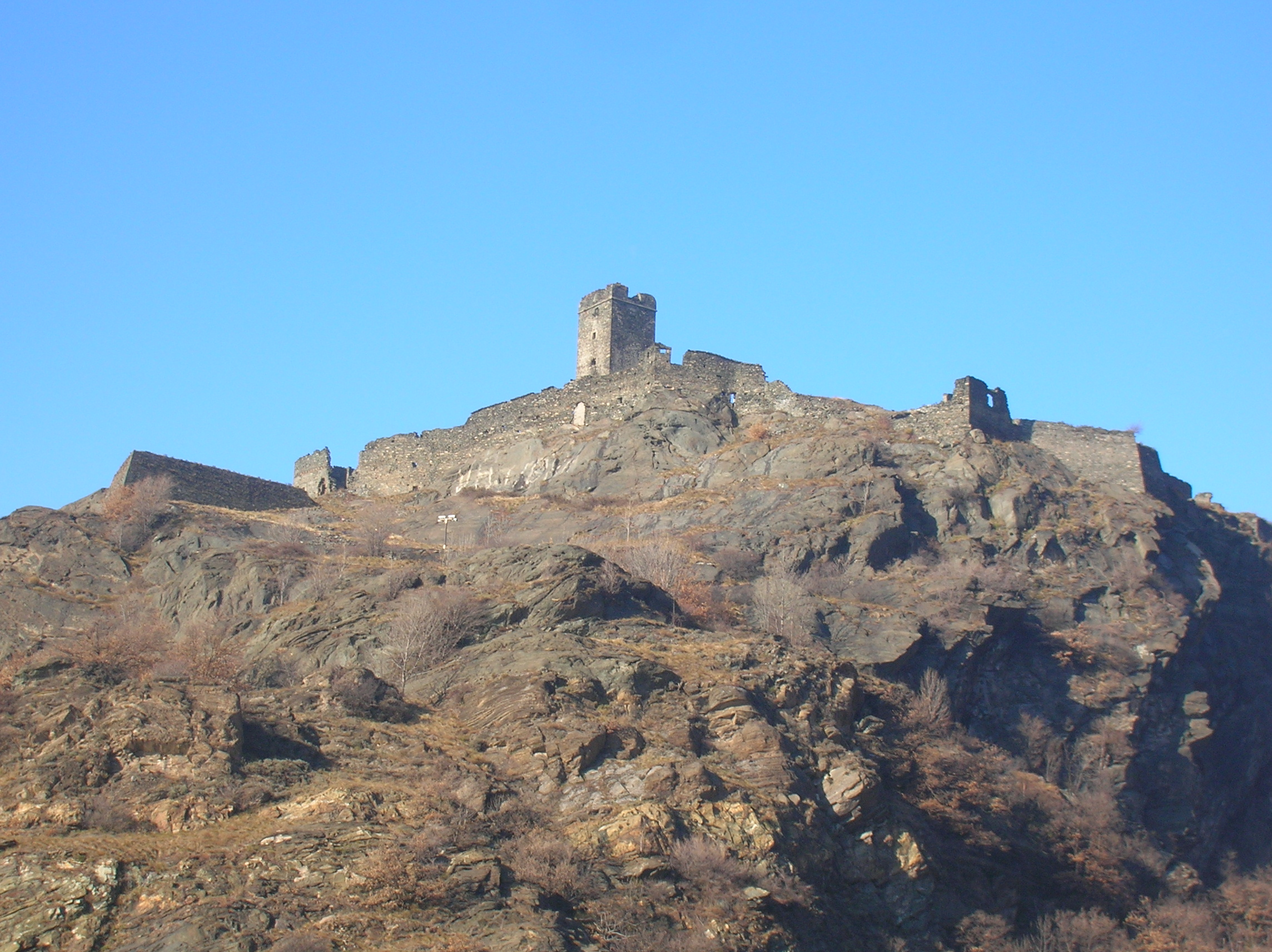 Castello di Saint-Germain dal lato sud. Il Castello di Saint-Germain si trova nel territorio del Comune di Montjovet, Valle d'Aosta, Italia.